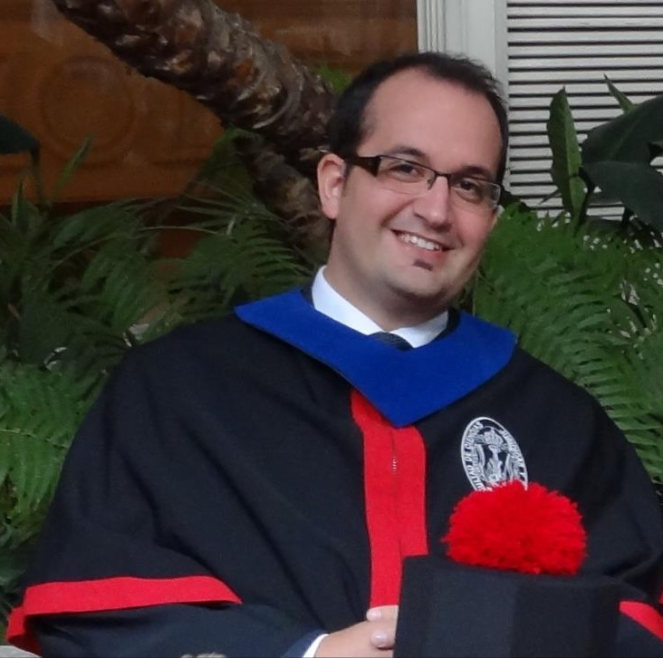 En agosto de 2012, Carlés obtuvo su segundo doctorado (Doctor en Ciencias Penales, Universidad de San Carlos de Guatemala).